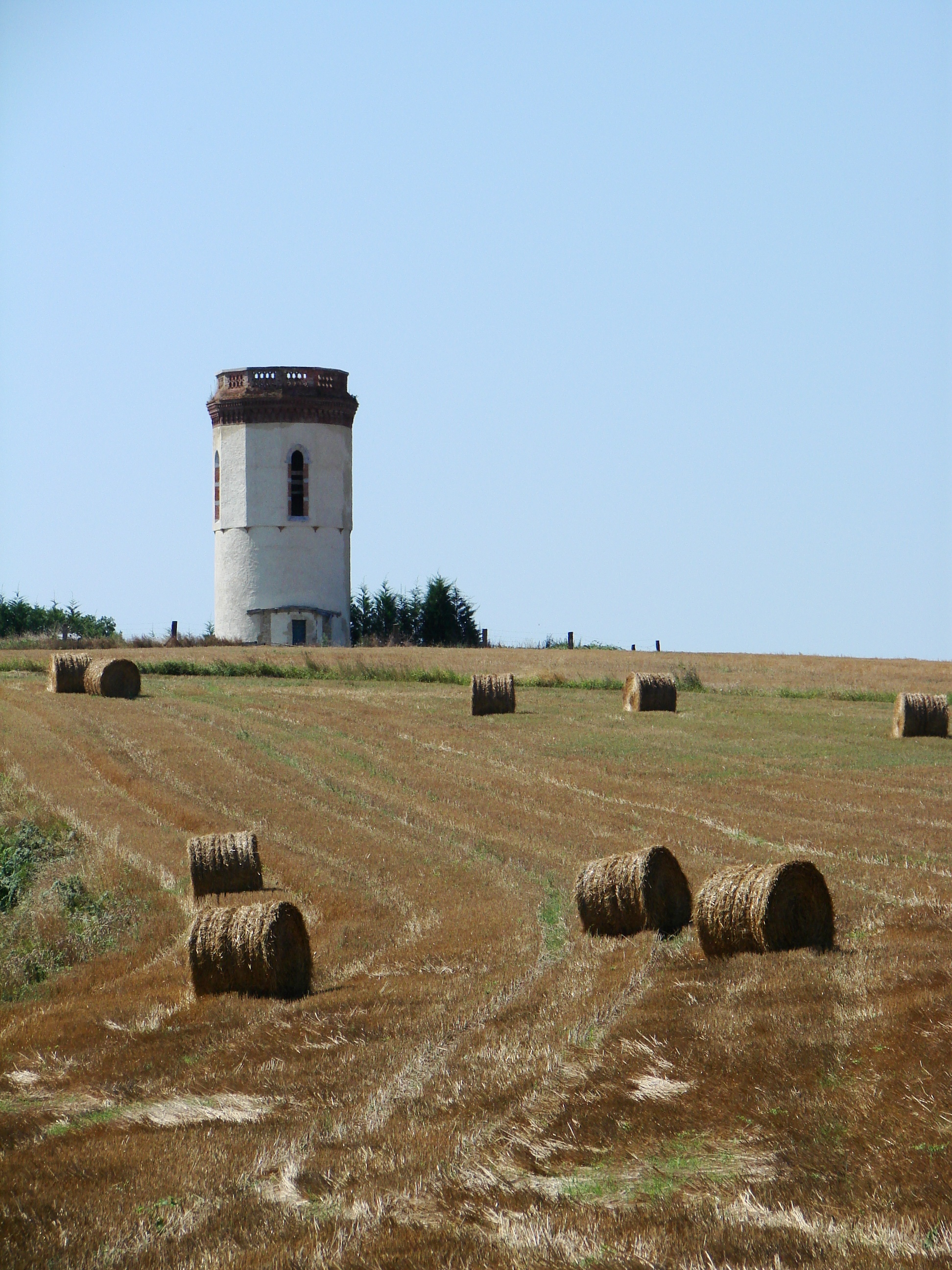 Vue du village de Oléac-Debat dans les Hautes-Pyrénées (France) : Champ moissonné et tour d'Oléac